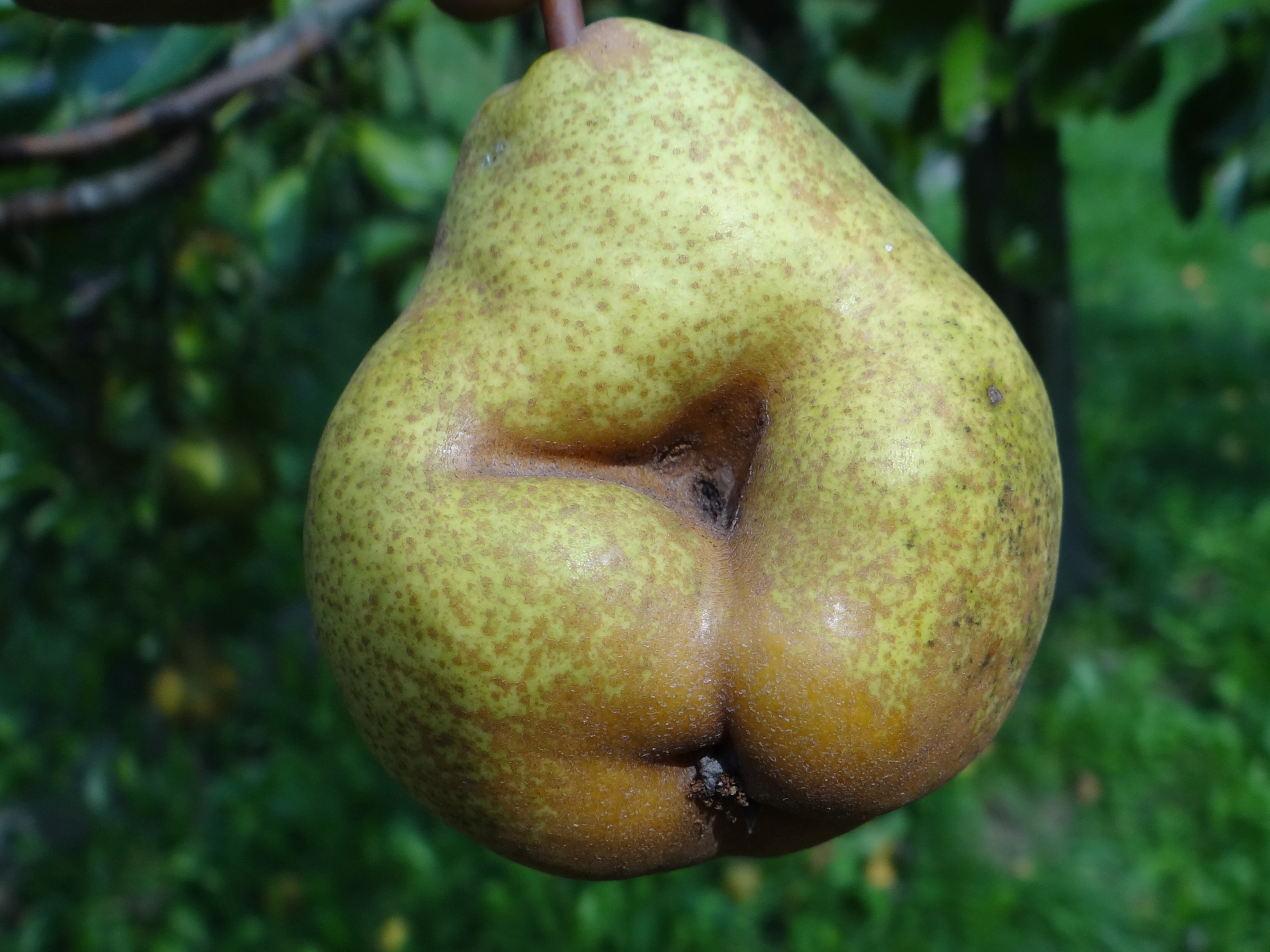 Venturia pyrina on Pyrus communis 'Bera'. Location: Poland, Trzciana, województwo małopolskie